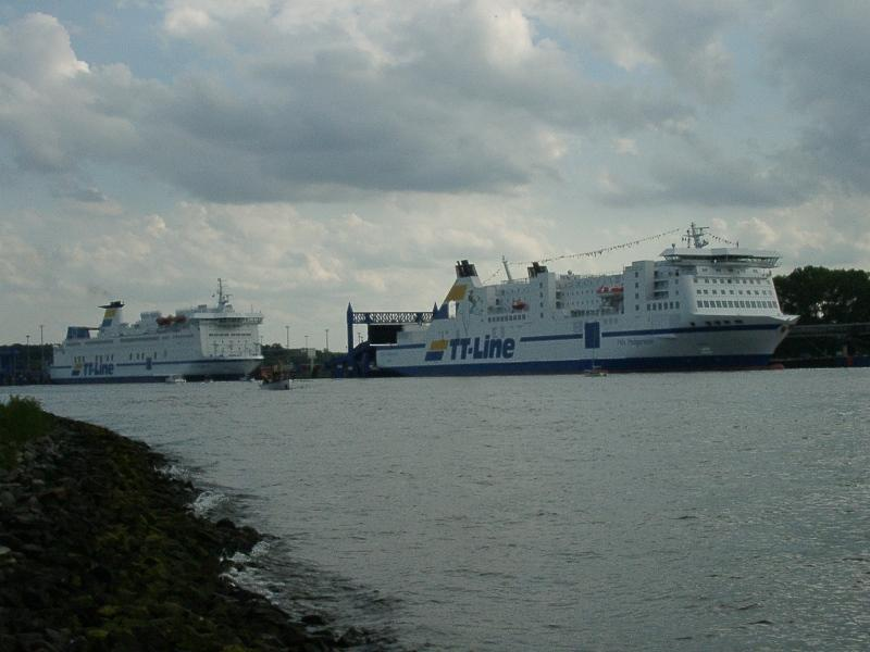 TT-Line vessels Nils Holgersson V and Nils Holgersson VI